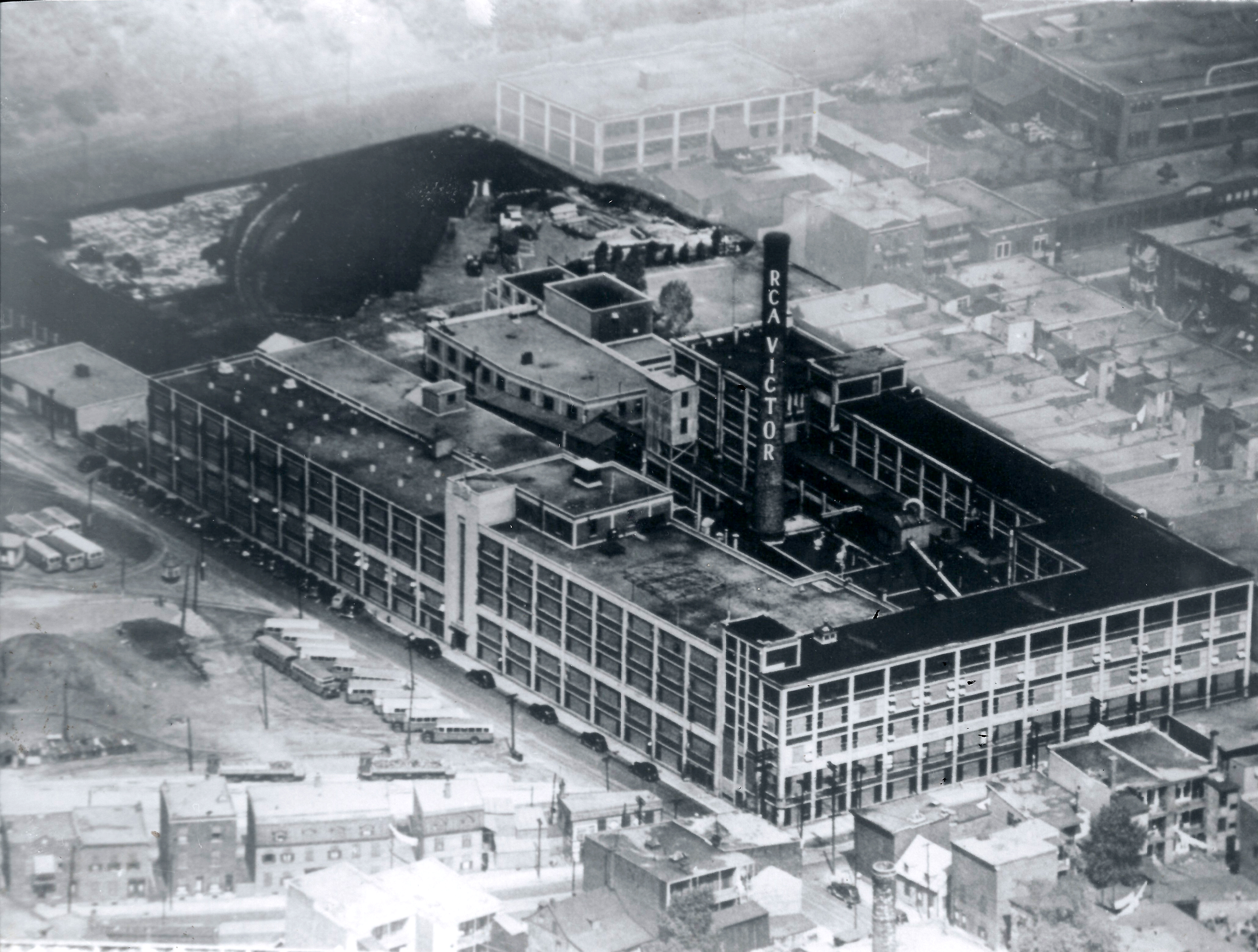 Berliner Gram-o-phone/RCA Victor Fabrik in Montreal, um 1943. Beherbergt seit 1992 das Musée des ondes Emile Berliner